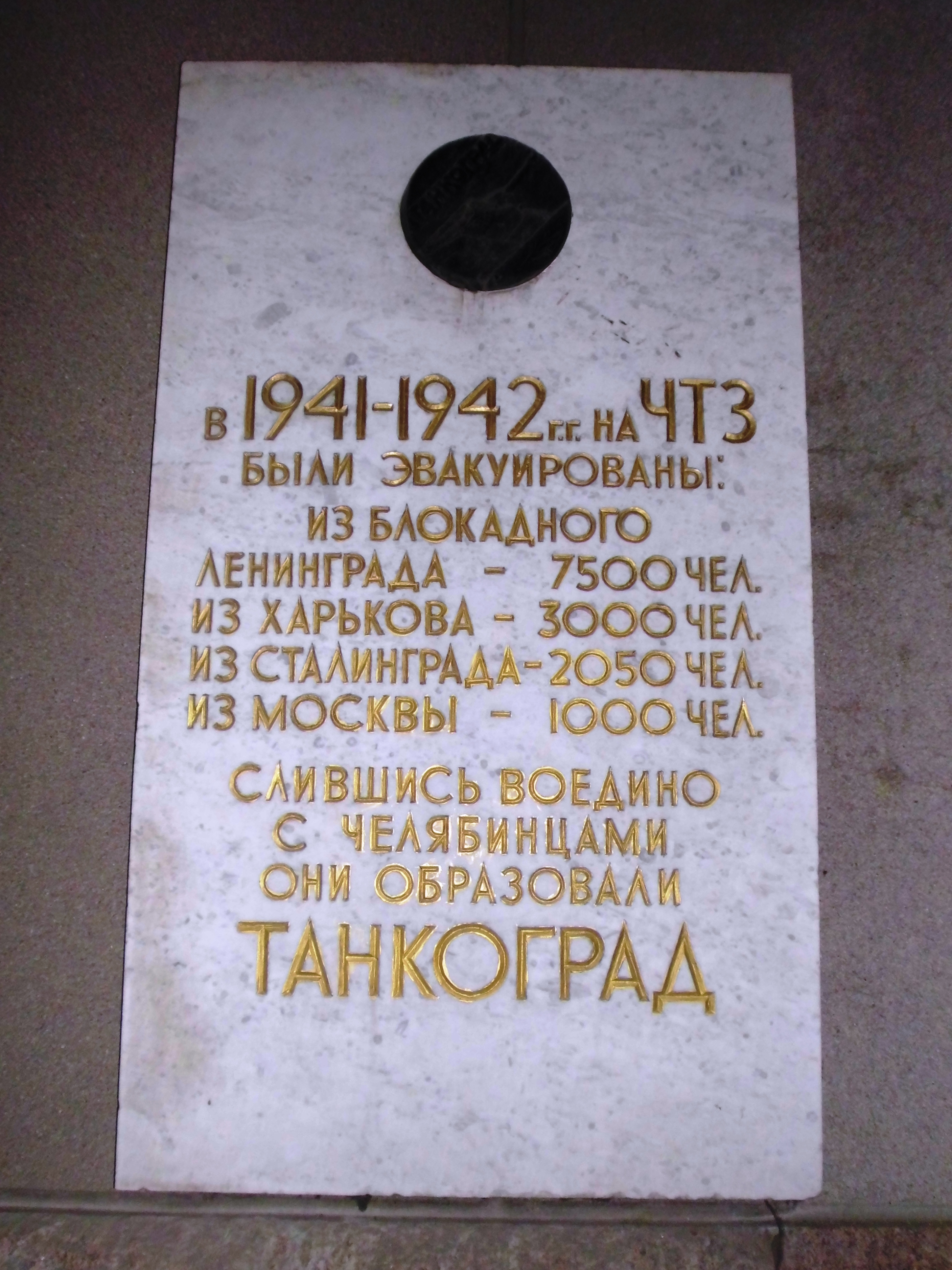 Здание заводоуправления ЧТЗ, которое посетили деятели государства и работали видные ученые: проспект Ленина, 3, Челябинск, Челябинская область. Памятные таблички у главной проходной завода.